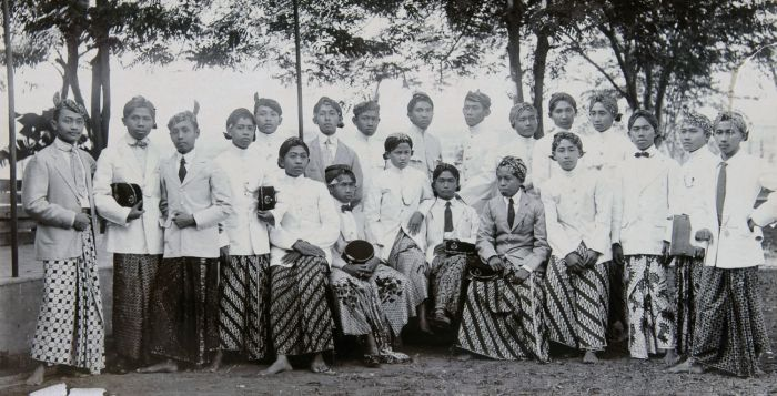 Foto. Groepsportret leerlingen van de Opleidingsschool voor Inlandse Ambtenaren (OSVIA) in Probolinggo